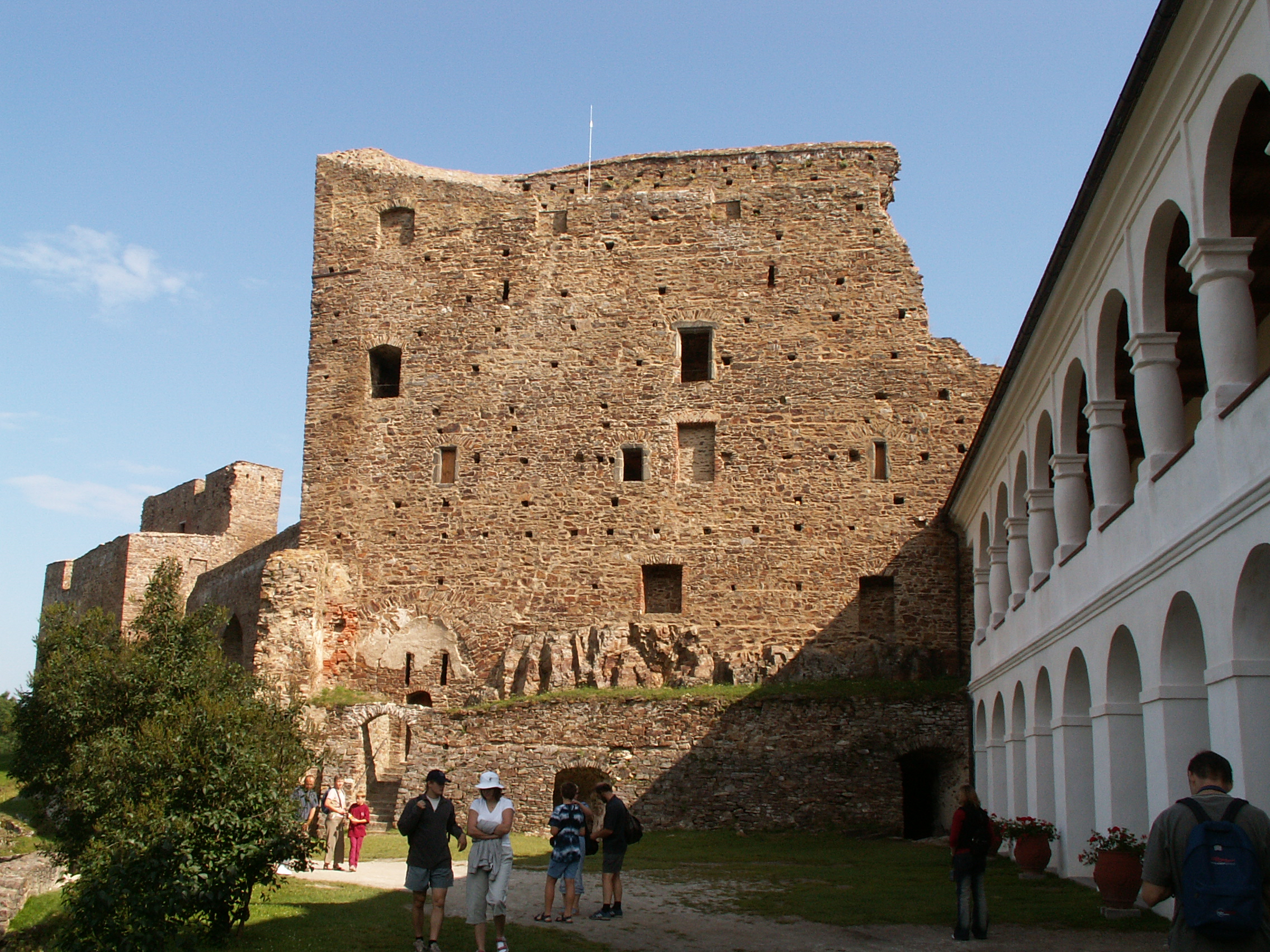 Hrad Velhartice